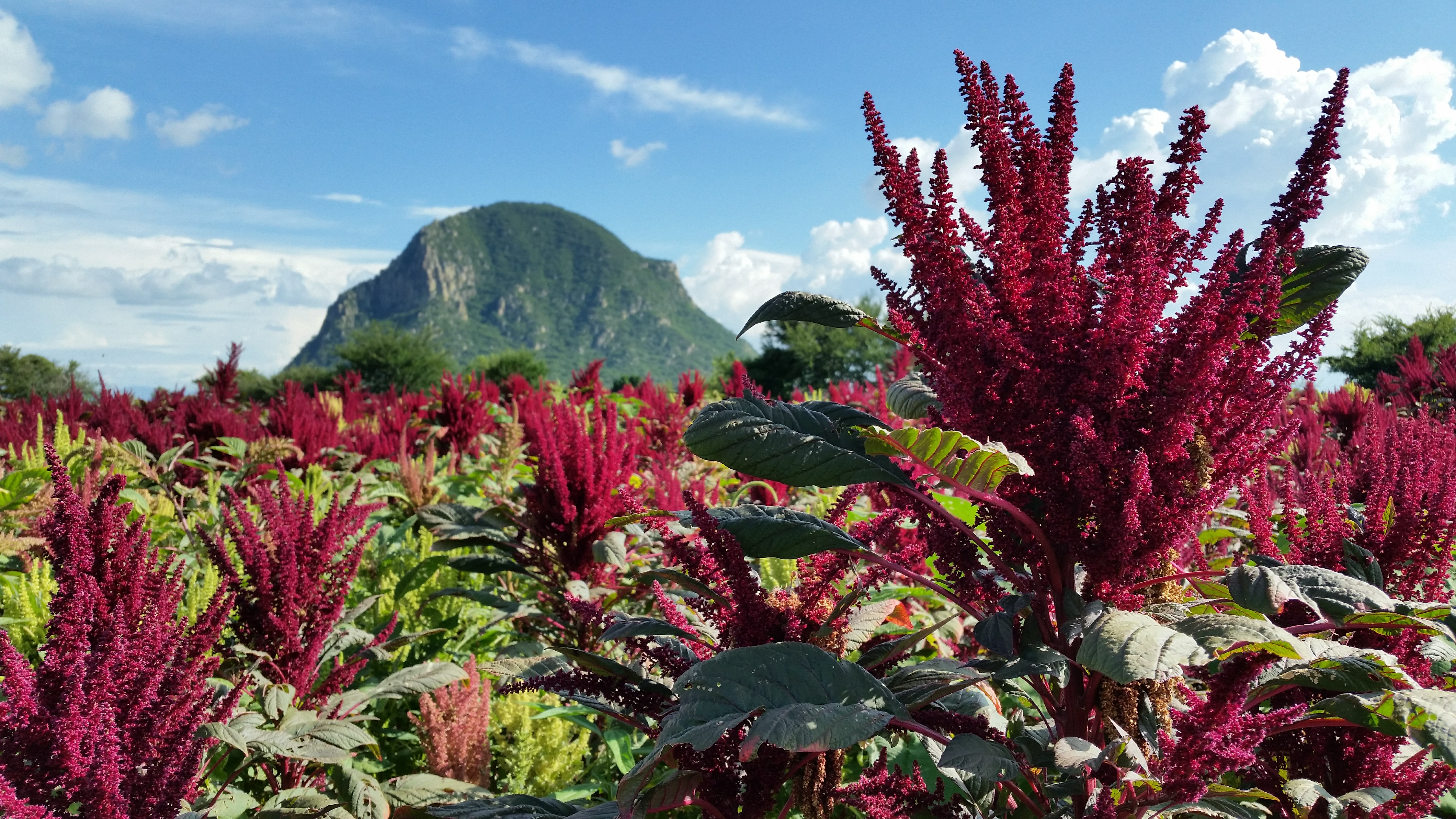 Plantío de amaranto en el poblado de Amilcingo en el municipio de Temoac, de fondo el cerro del Chumil o cerro del mono de Jantetelco